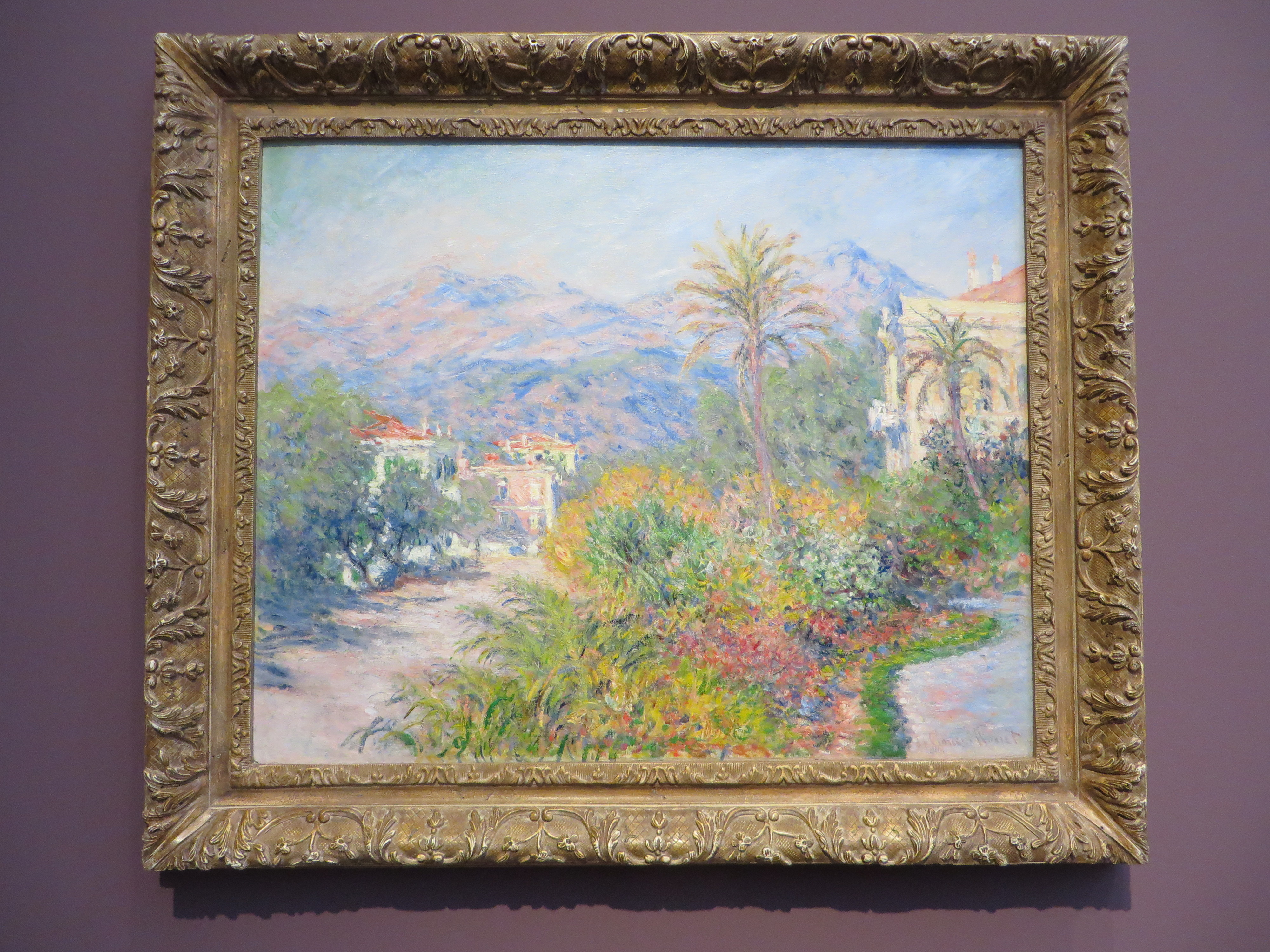 Barberini Museum Potsdam. Ausstellung „Impressionismus - Die Kunst der Landschaft“, Frühjahr 2017. Claude Monet: Strada Romana in Bordighera (1884).